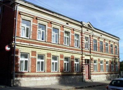 Последний дом, куда Троицкий переехал вместе с семьёй после отставки на улице Скромной, 11 (сейчас Э. Вейденбаума, 13/15)